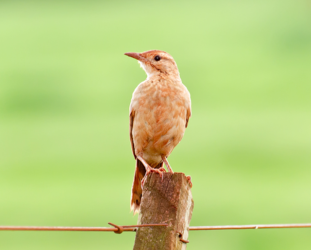 Piraju-SP - Brasil